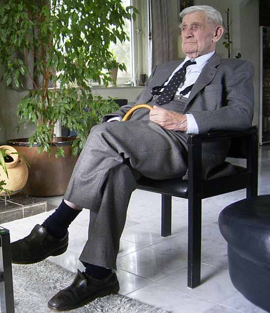 Roelof Koops. Schaatser uit Zuidlaren (provincie Groningen), heeft mee gedaan aan de Olympische Winterspelen in 1936